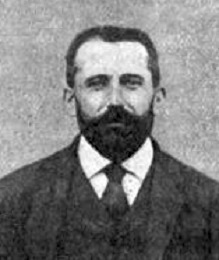 Émile Mayade - Histoire de l'automobile, Pierre Souvestre, éd. H. Dunod et E. Pinat, 1907 (ASIN B001BPBE58) p.319